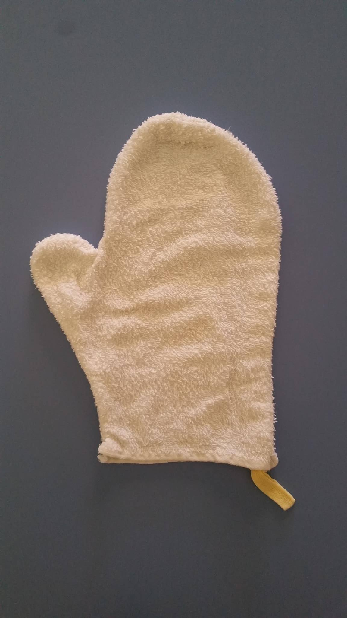 Λαβέτα με ξεχωριστό αντίχειρα